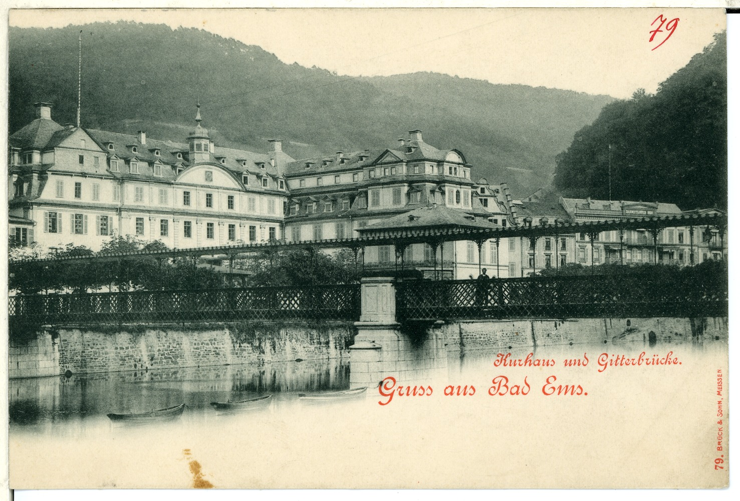 Bad Ems; Kurhaus und Gitterbrücke This postcard is from publisher Brück & Sohn in Meißen ( This postcard has a unique number 00079 and is available in a higher resolution at the publisher. This images was uploaded in a cooperation project between Wikipedians and the publisher.